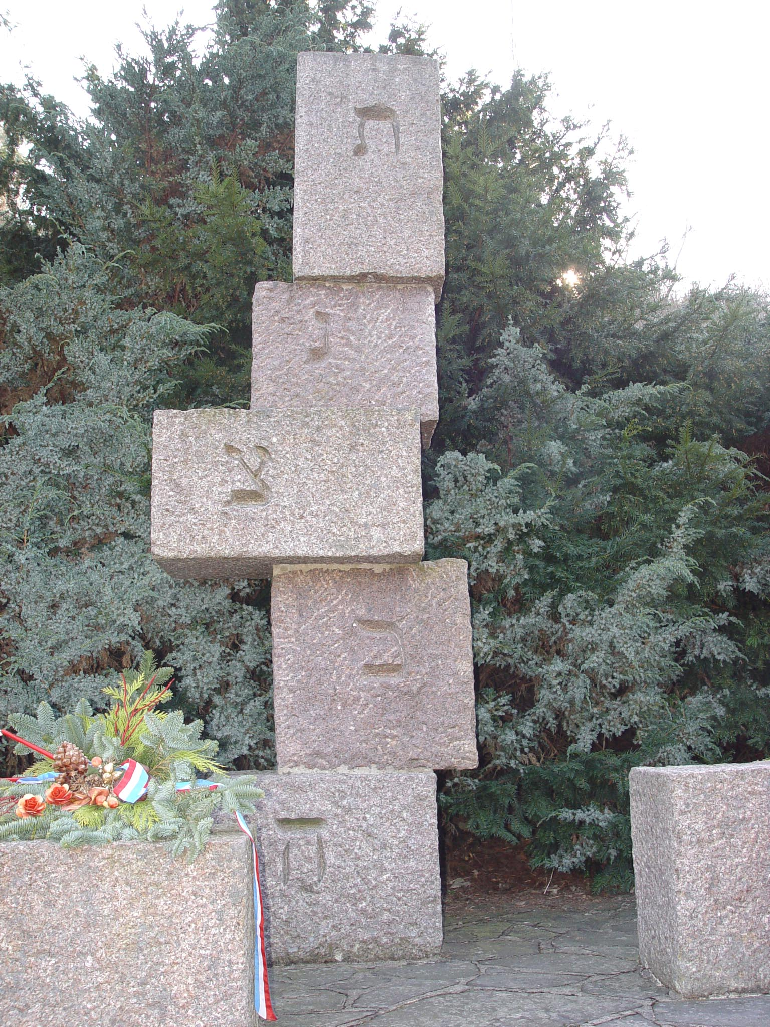 Auschwitz-Monument in der luxemburgischen Ortschaft Pafemillen